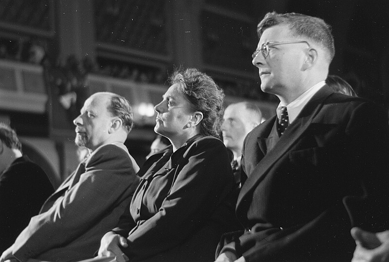 Original image description from the Deutsche Fotothek Portrait Dmitri Dmitrijewitsch Schostakowitchs sowie Walter und Lotte Ulbrichts im Publikum der Bachfeier aus Untersicht